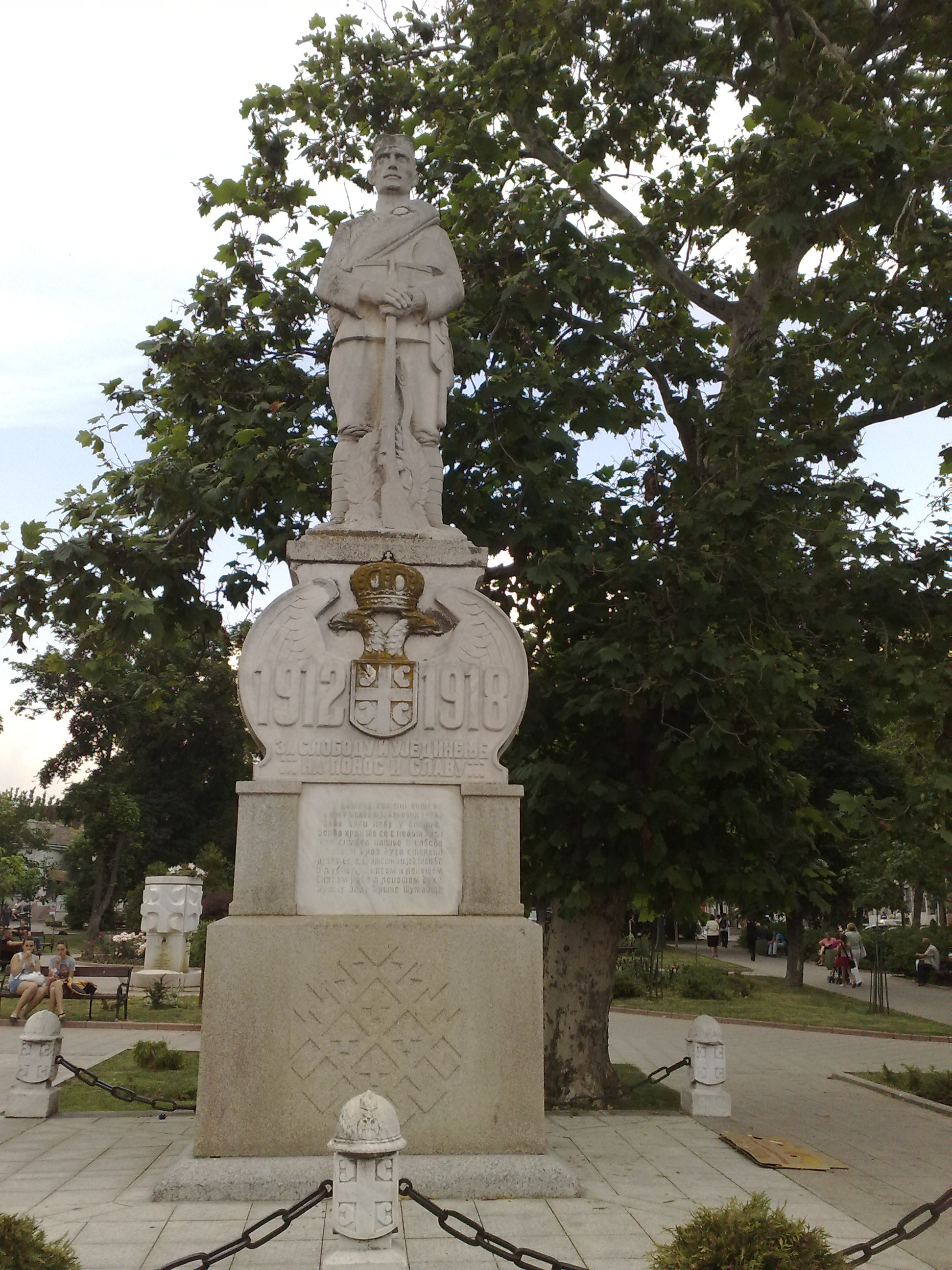 Spomenik u Mladenovcu posvecen poginulim Mladenovcanima u ratovima 1912—1918